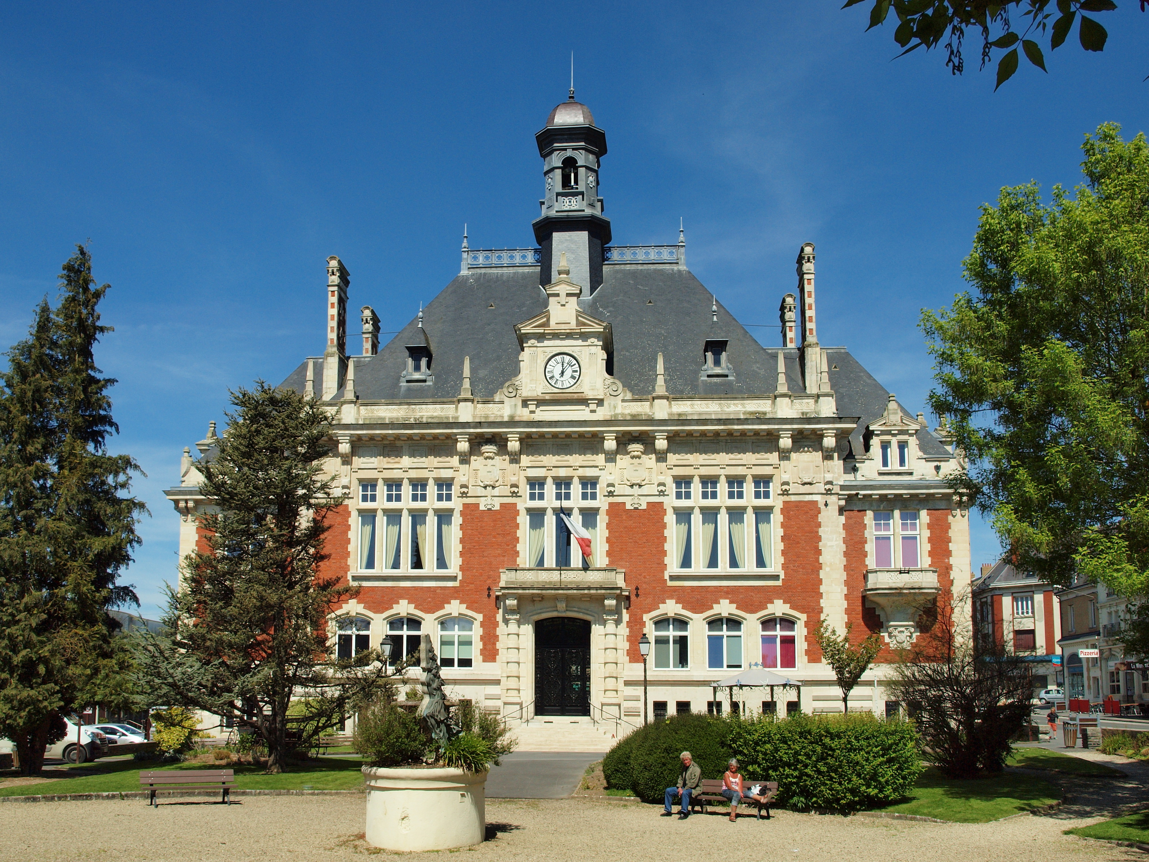 Hôtel de ville de Rethel (Ardennes, France)